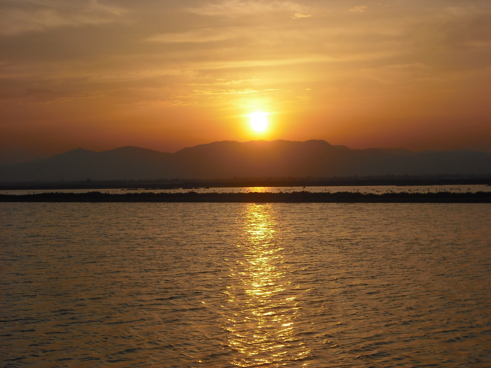 Posta de sol a les Salines de Santa Pola.